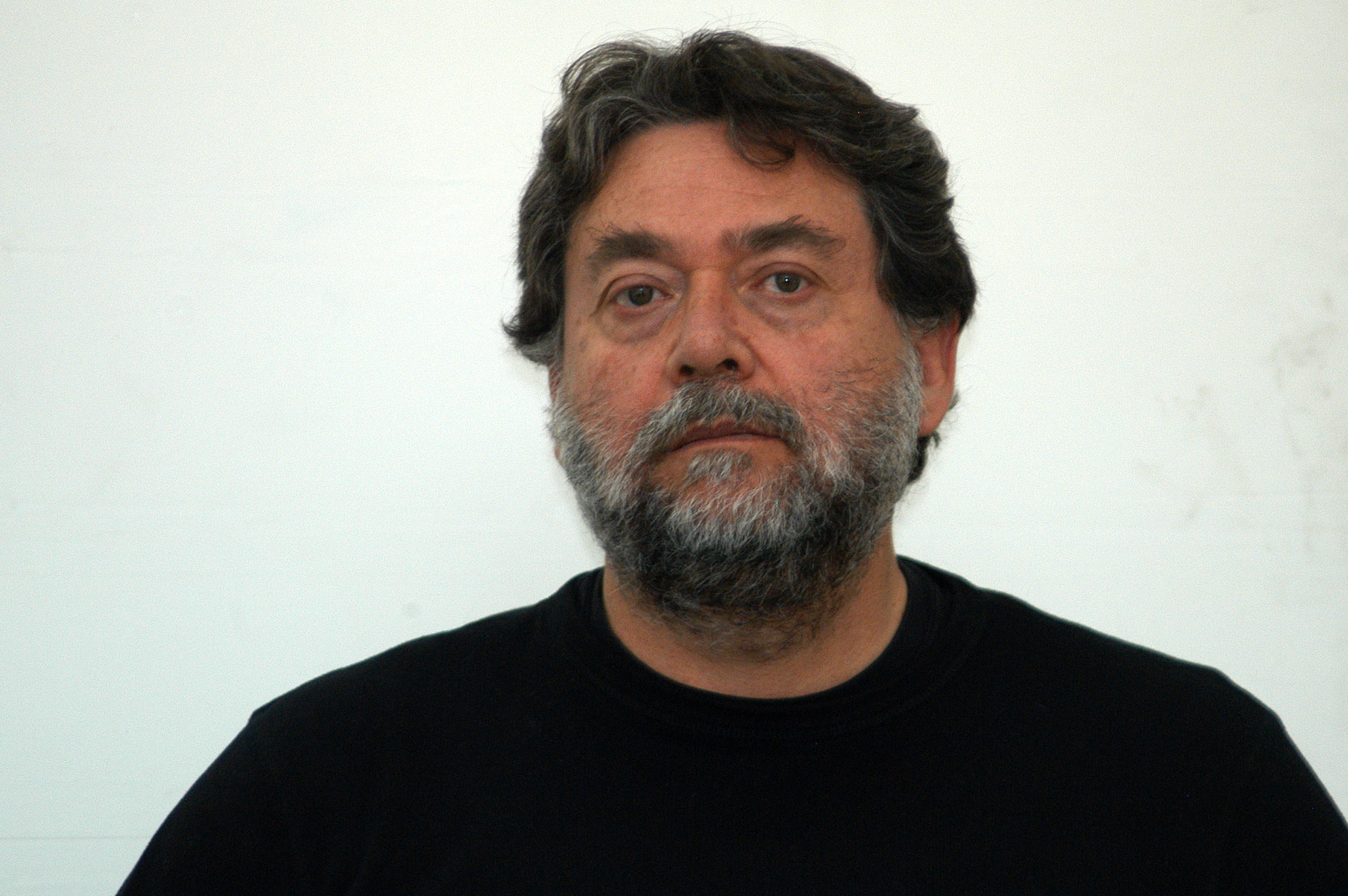 Guadalajara, Jalisco, 7 de marzo de 2008. Guillermo Navarro durante su charla Escribiendo con luz, realizada en la casa Zuno.